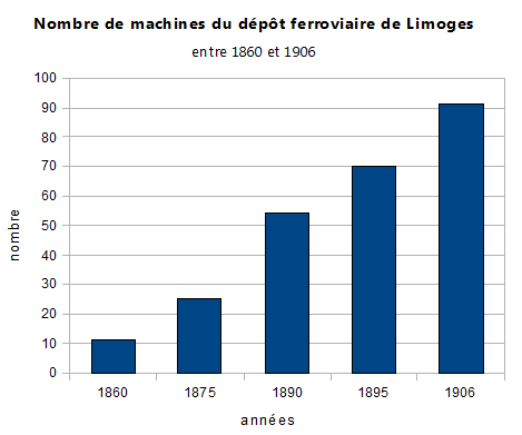 Évolution du nombre de machines en dépôt à la gare de Limoges entre 1860 et 1906